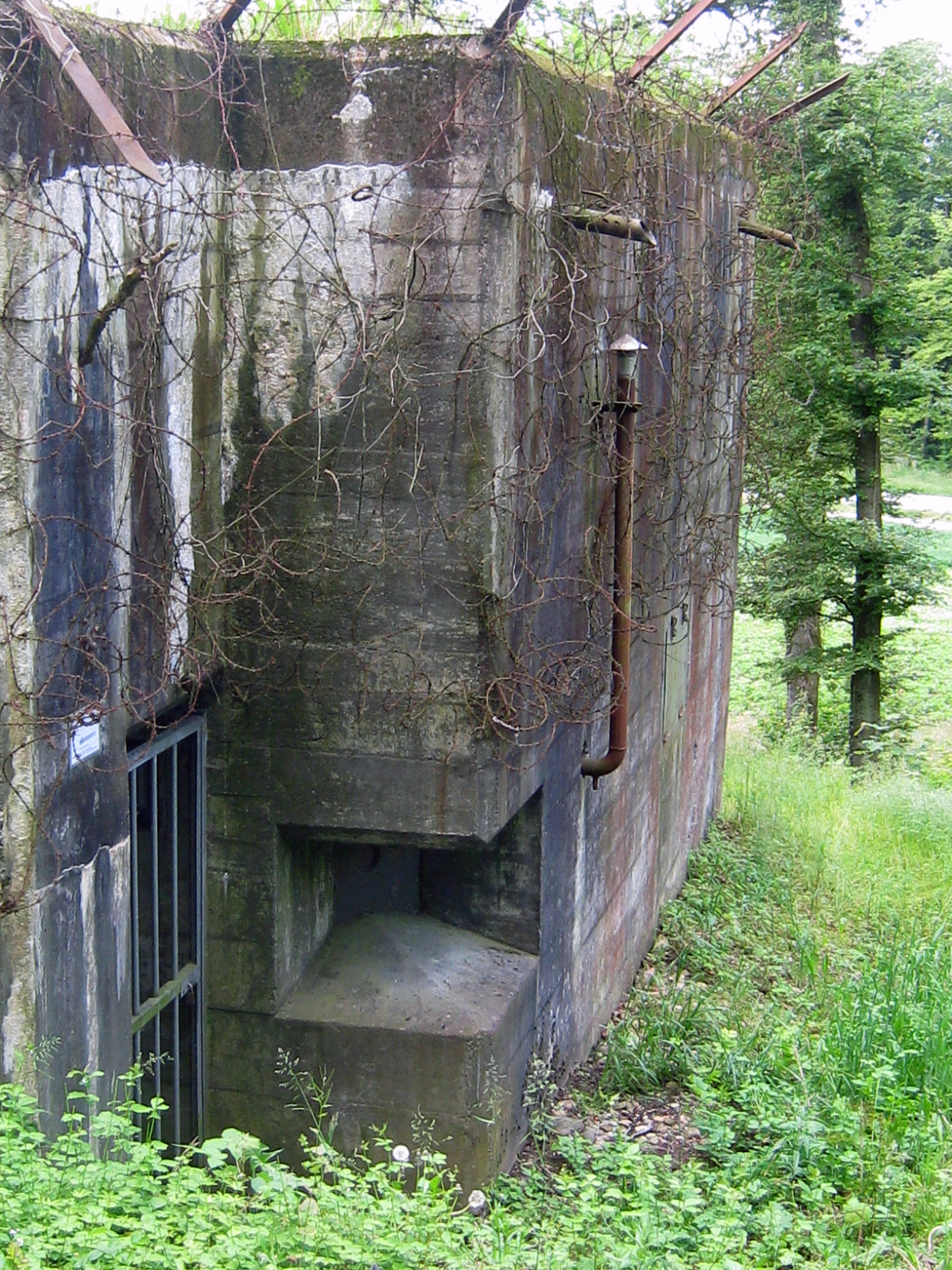 Eingang Infanteriebunker Bettlerküche in Reuenthal, Baujahr 1941, Sperrstelle Reuenthal-Full der Grenzbrigade 5